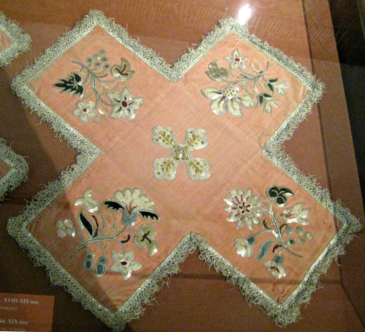 Воздух. Покровцы. 19 век. Кирилло-Белозерский монастырь